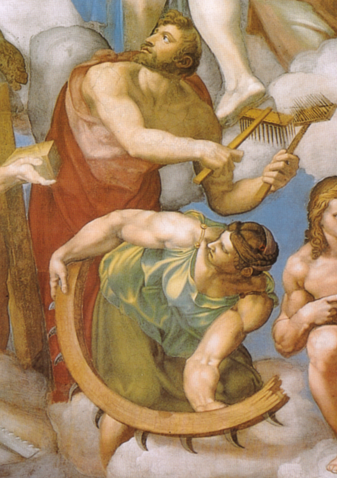 MICHELANGELO Buonarroti Last Judgment Fresco, 1370 x 1220 cm Cappella Sistina, Vatican